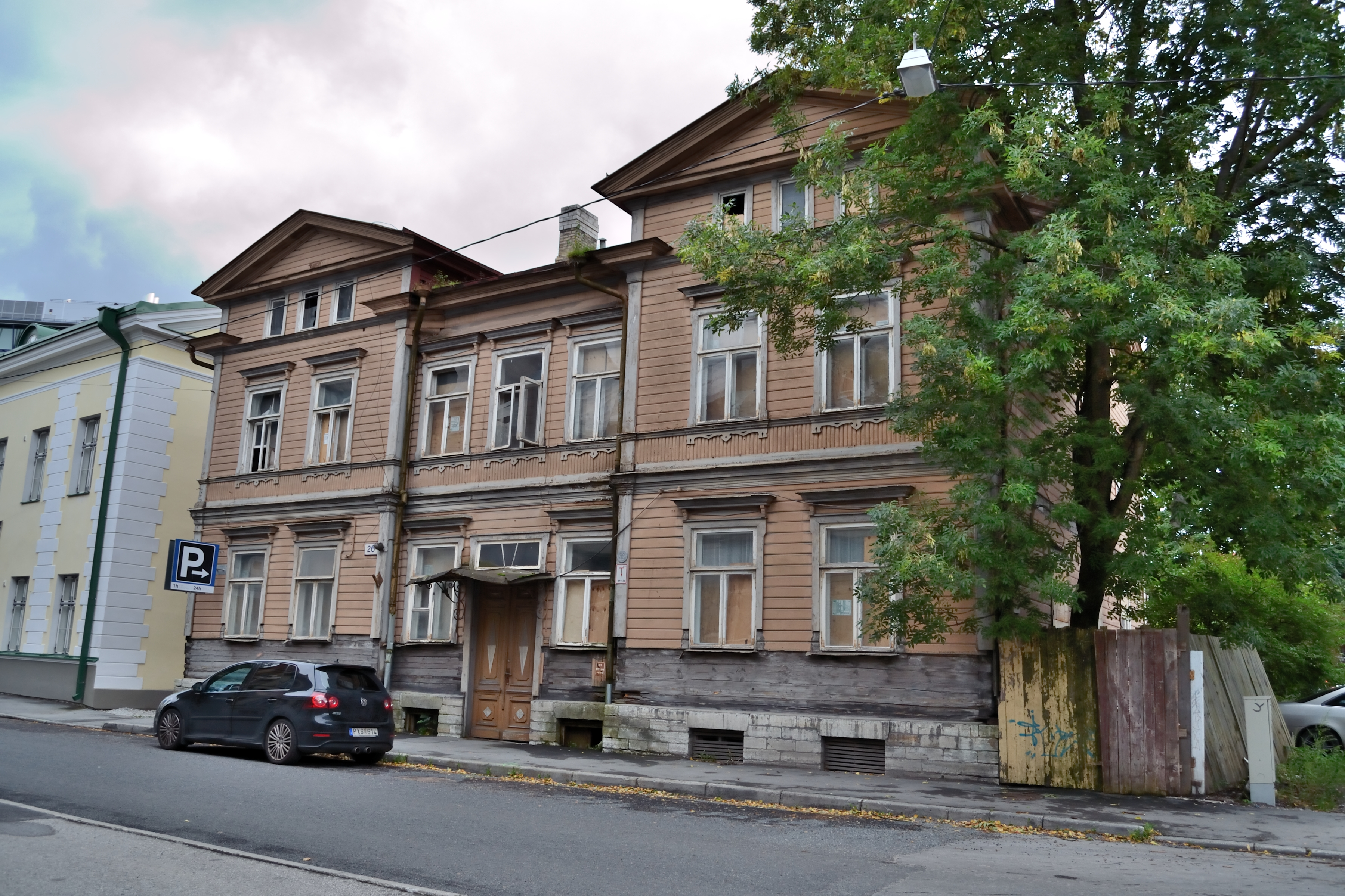 Tallinn, elamu Tatari 26